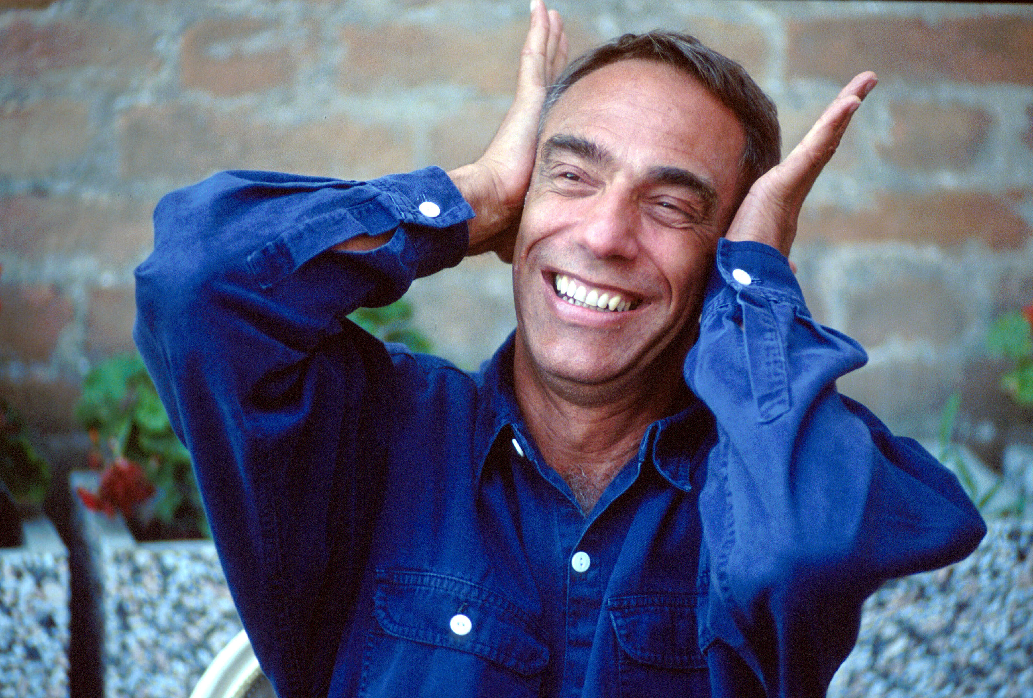 Il regista britannico Derek Jarman alla Mostra del cinema di Venezia del 1991